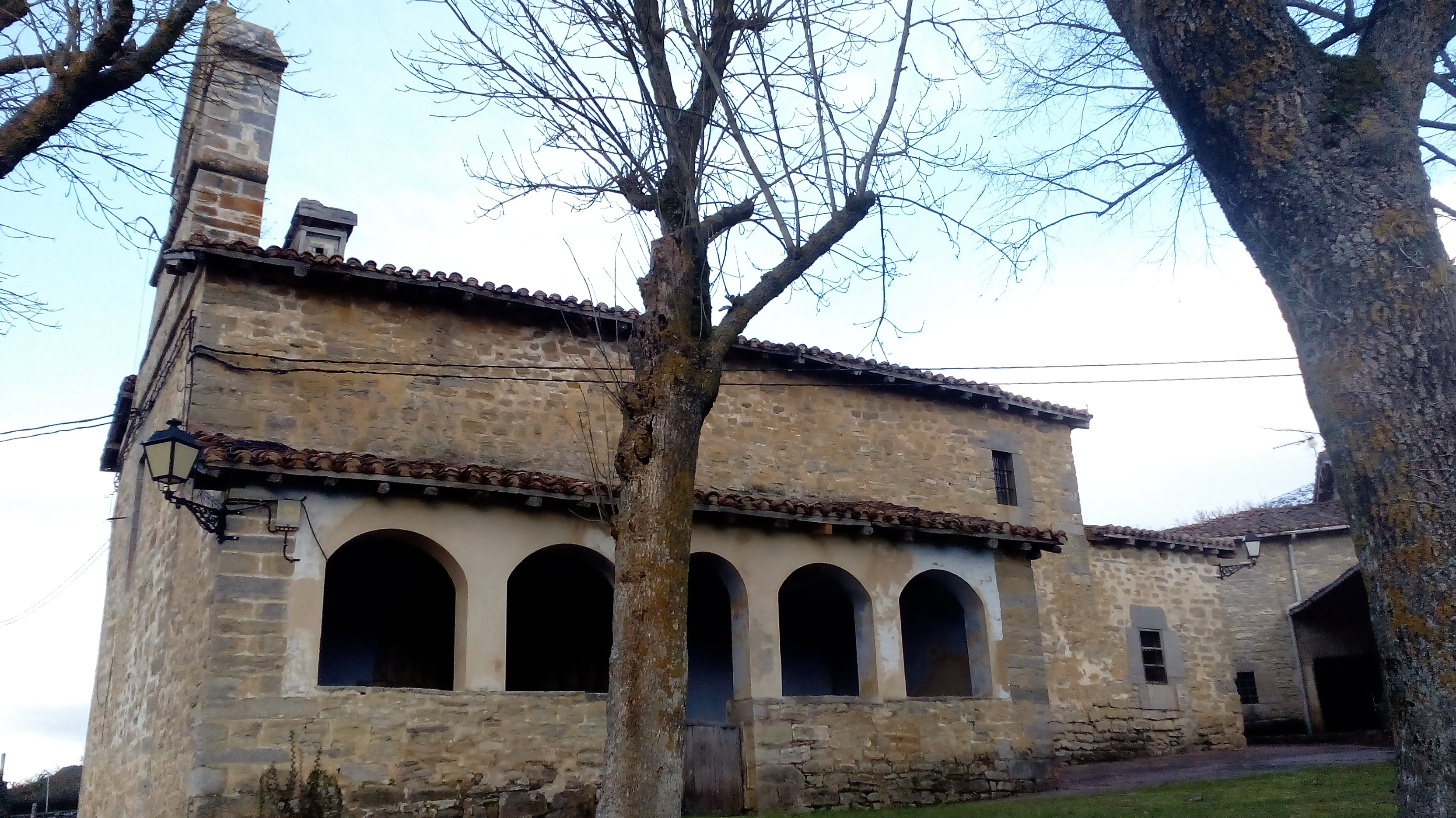 Urbina Ezako (Kuartango, Araba) San Joan Ebanjelariaren eliza, mendebaldetik ikusia